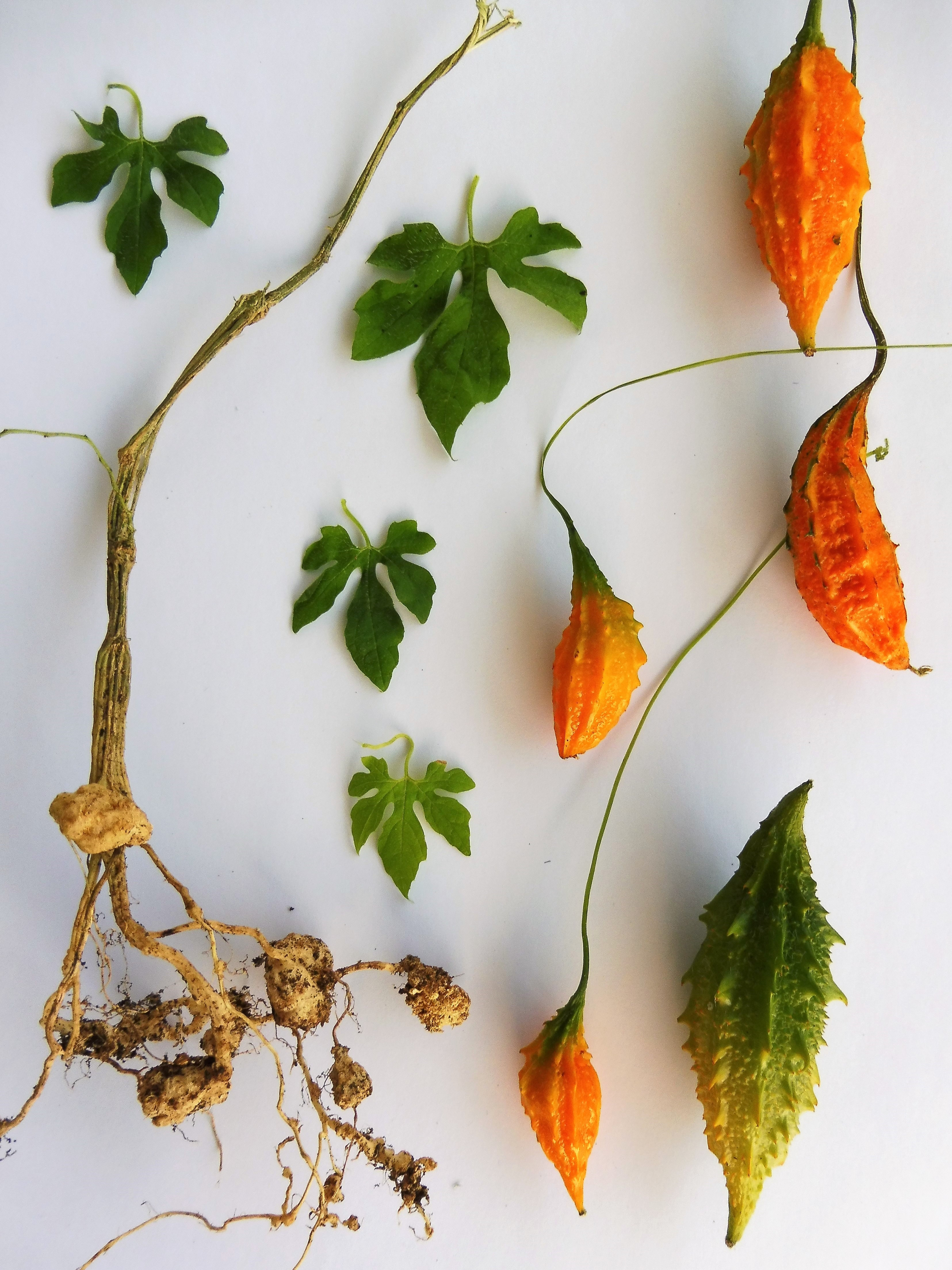 Jeunes feuilles de Momordica charantia, avec des fruits plus ou moins mûrs, une tige et des racines présentant des nodosités, prélevés à Nouméa, en Nouvelle-Calédonie.